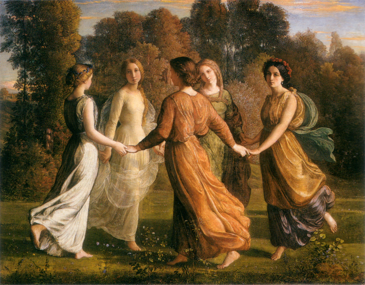 Poème de l'âme (13) : Rayons de soleiltitle QS:P1476,fr:"Poème de l'âme (13) : Rayons de soleil" label QS:Lfr,"Poème de l'âme (13) : Rayons de soleil"